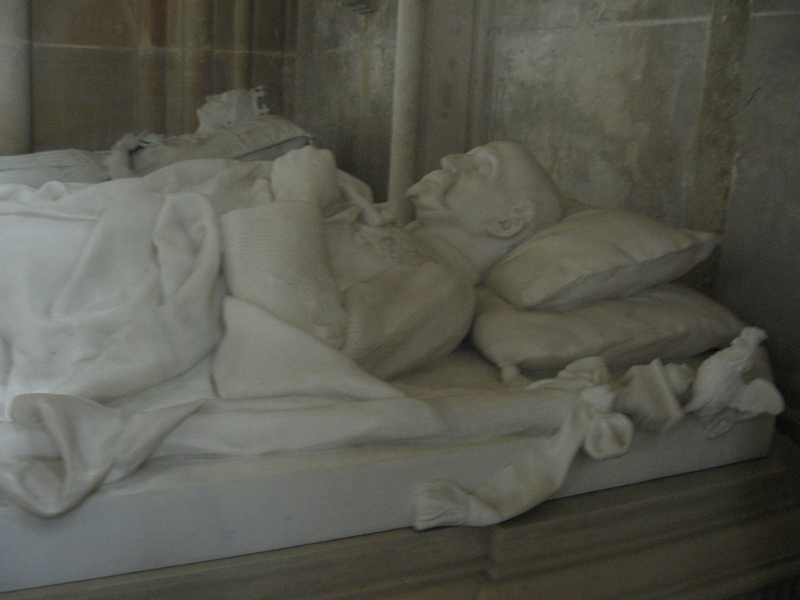 Gisants d'Henri d'Orléans (1822-1897) et de Marie Caroline de Bourbon-Siciles (1822-1869), le duc et duchesse d'Aumale